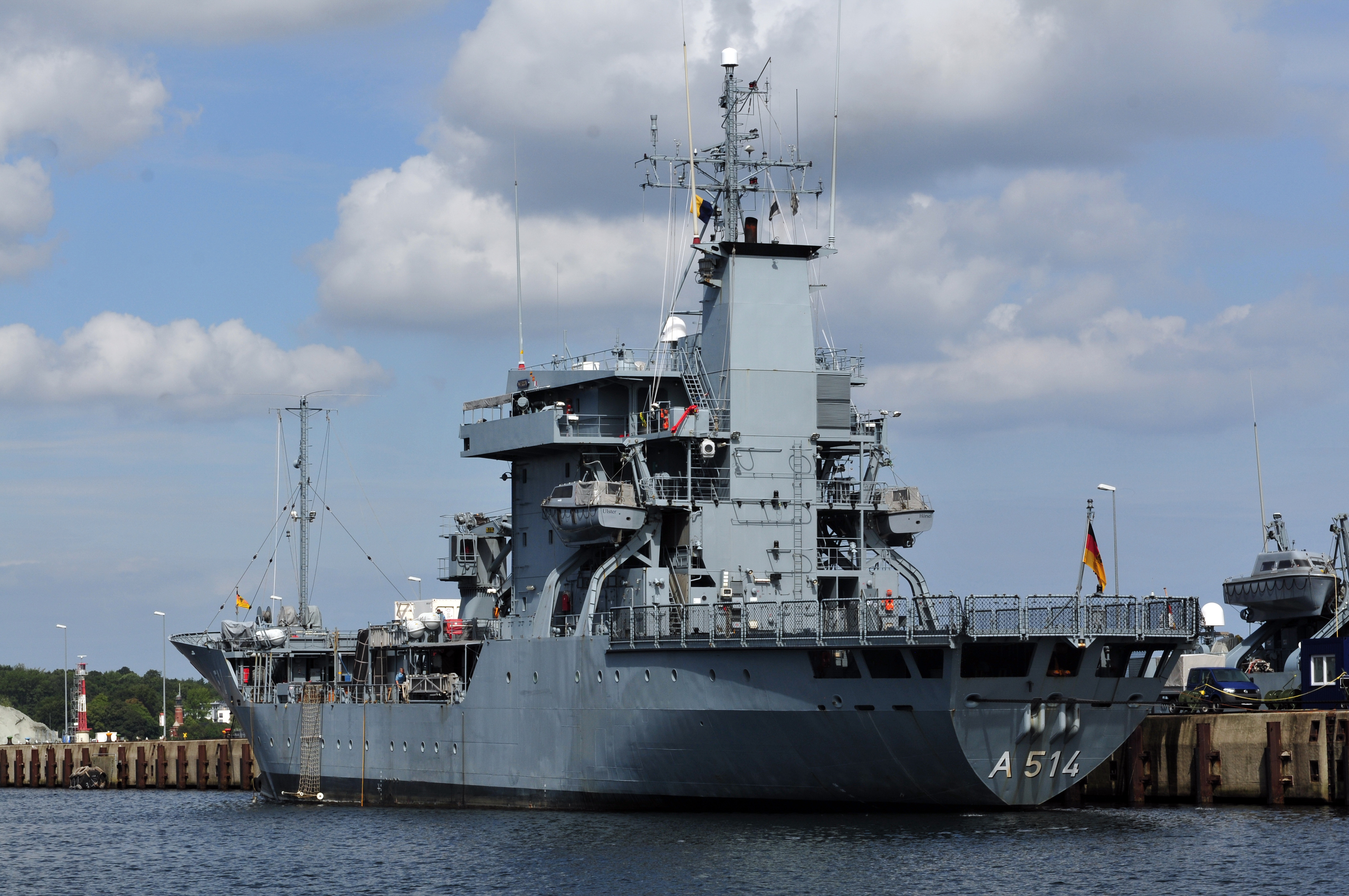 Landtagsprojekt Schleswig-Holstein; Marinestützpunktkommando Kiel